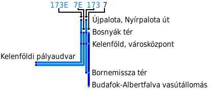 A 7-es autóbuszcsalád járatai, a 7-es autóbusz kiemelve